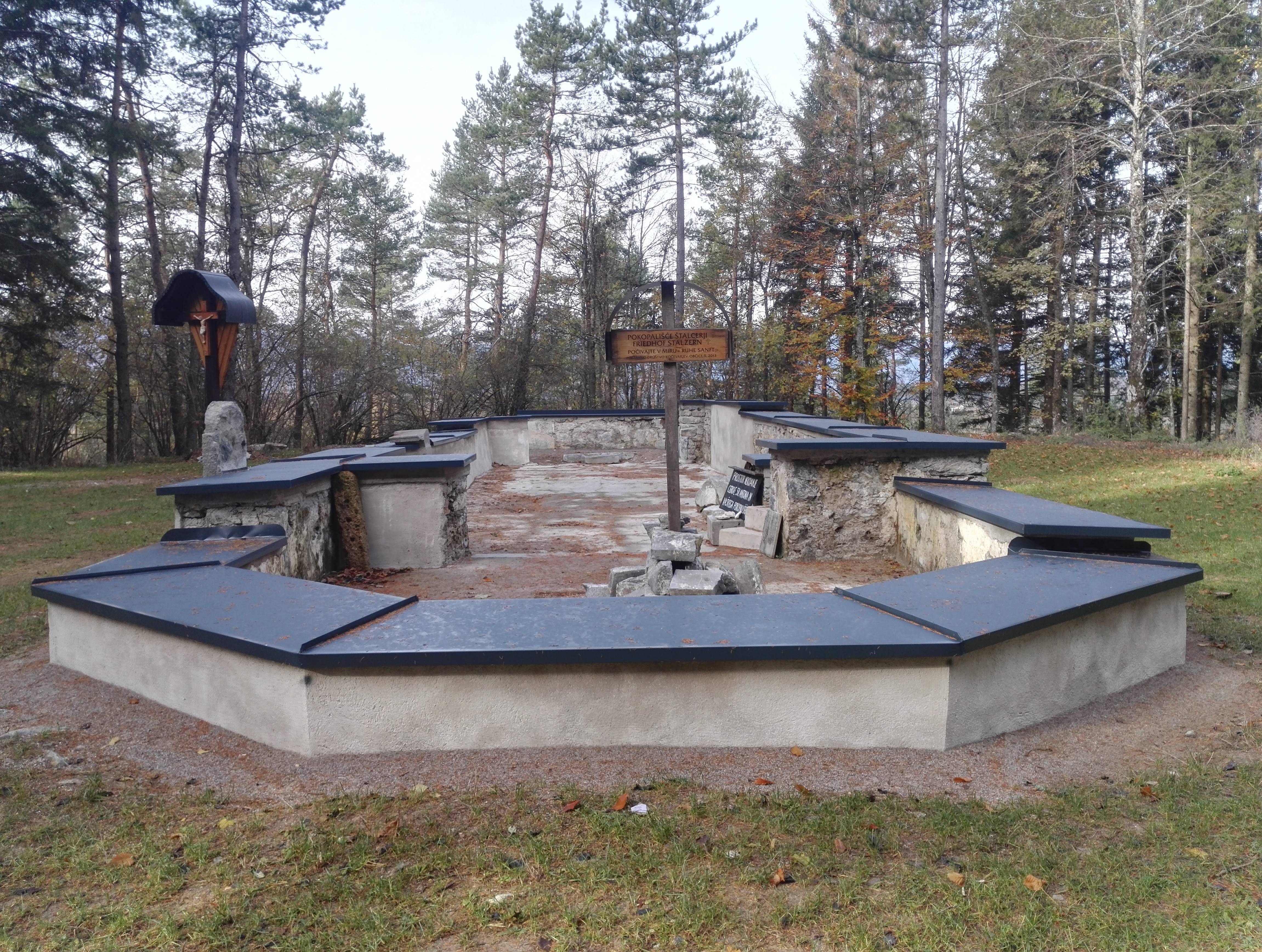 Prostor nekdanje cerkve Sv. Antona in vaškega pokopališča v Štalcerjih.